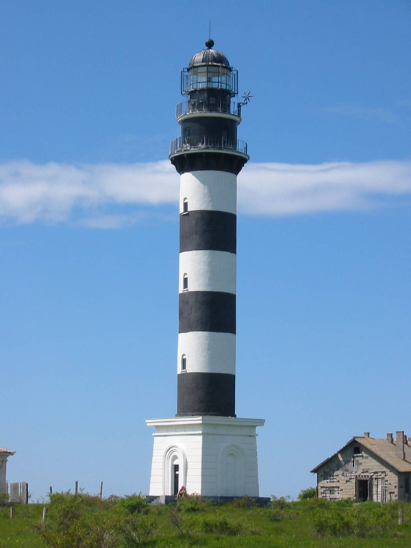 Osmussaar